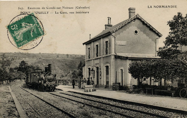 Carte postale